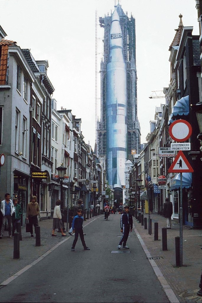 De Domtoren in Utrecht, met de Apollo raket van Chriet Titulaer in 1986